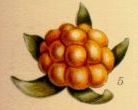 Hjortron (Rubus chamaemorus)